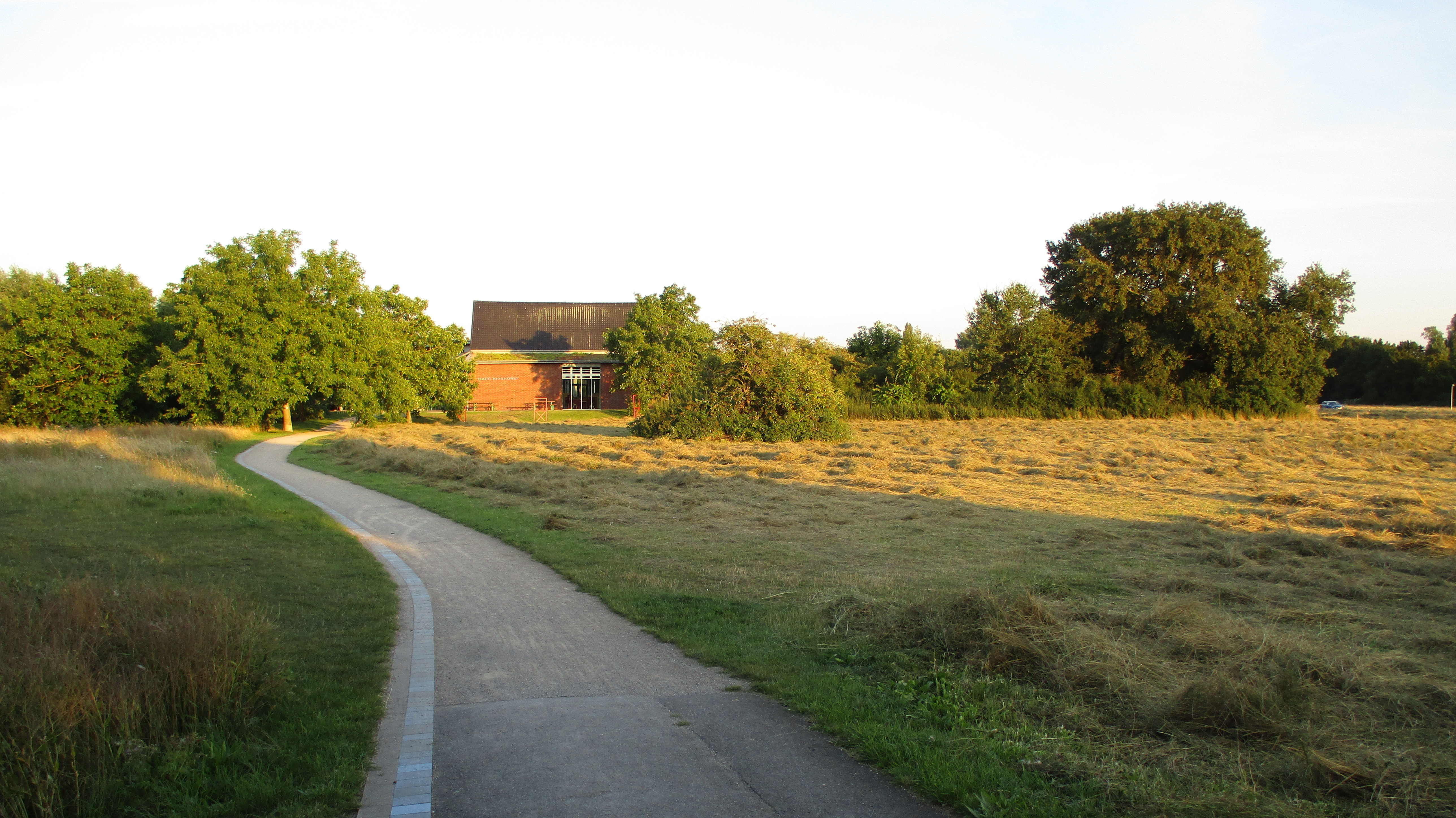 Haus Ripshorst in Oberhausen